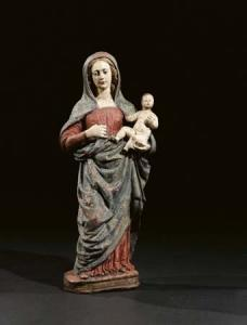 Agnolo Di Polo - Madonna Col Bambino